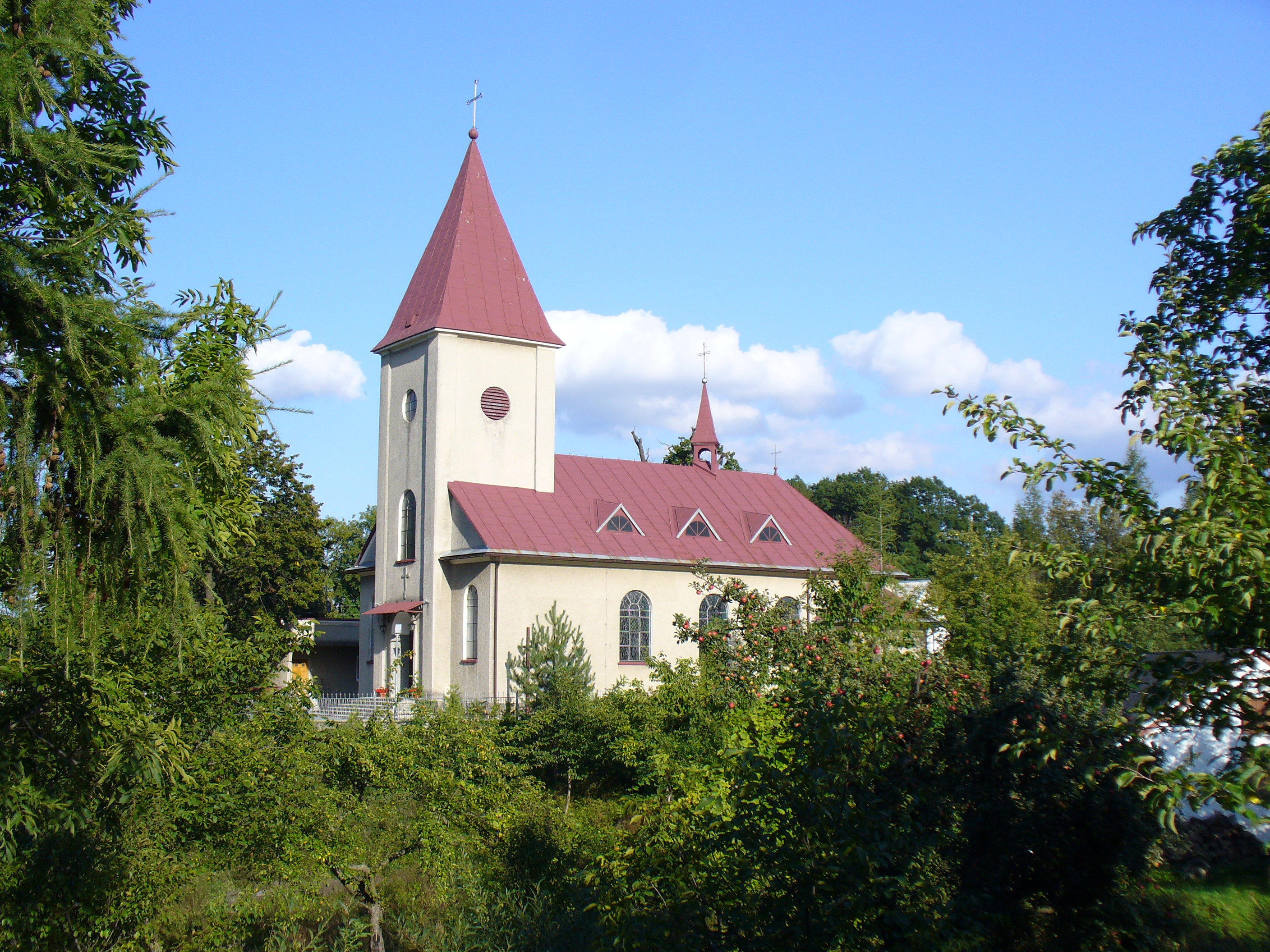 Głębokie kościół